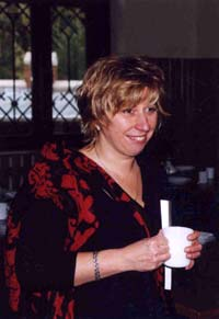 Elżbieta Samek-Czapla